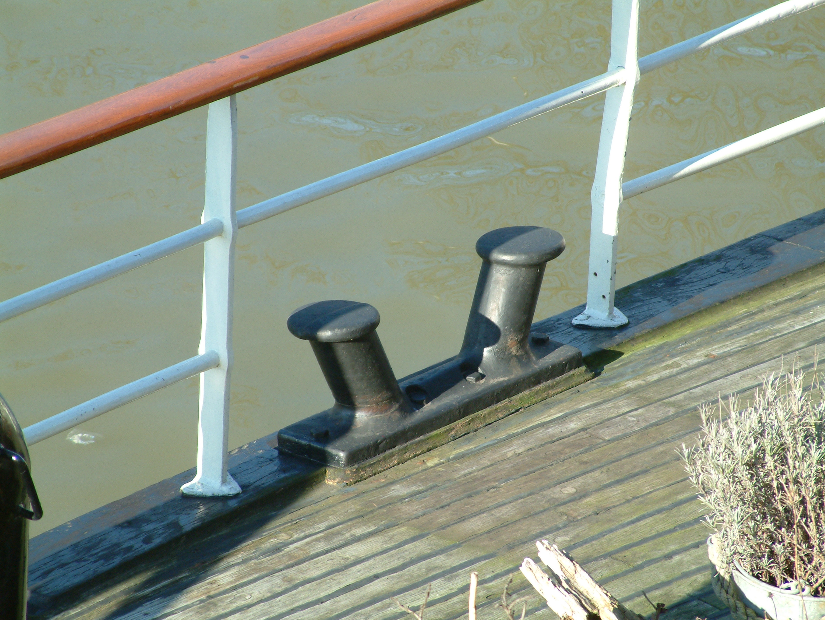 Een bolder als een kikker van de IJveer 1